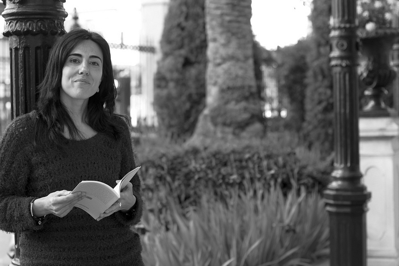 Entrevista en Granada